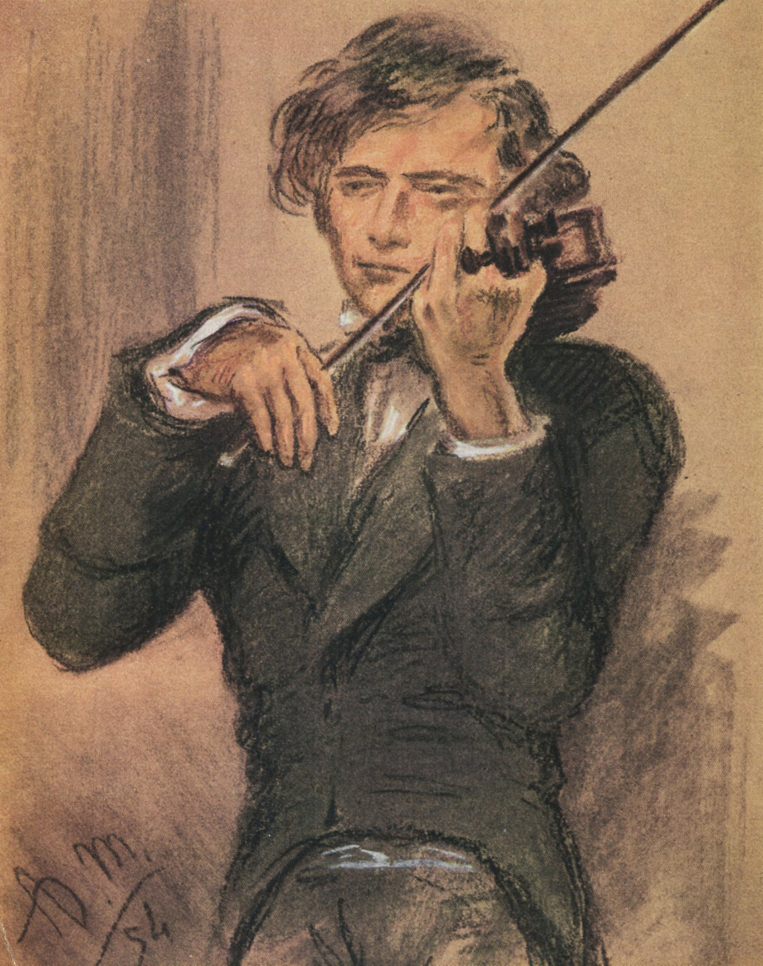 Krijttekening van Joseph Joachim rond 1853